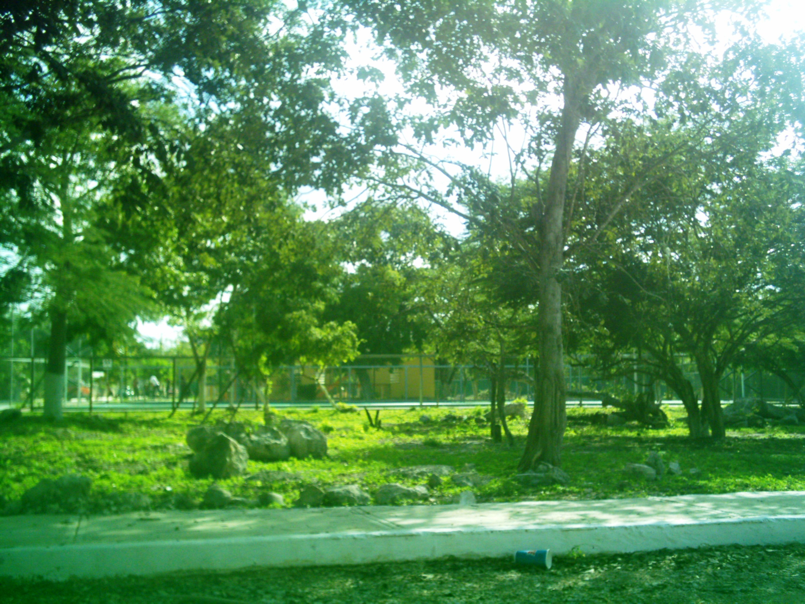 Canchas y parque de Santa María Yaxché, Yucatán.